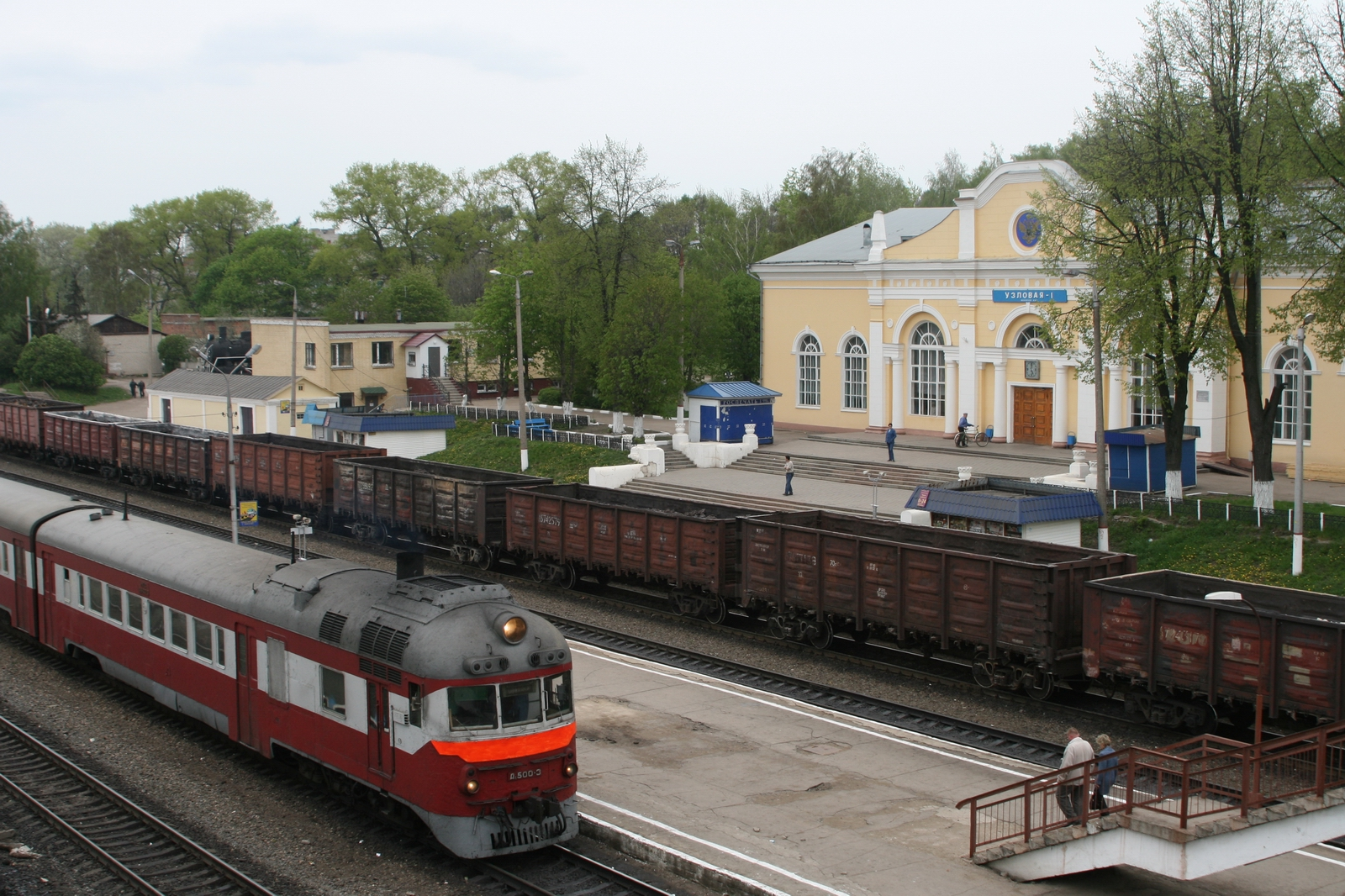 Станция Узловая-1 Московской Железной Дороги